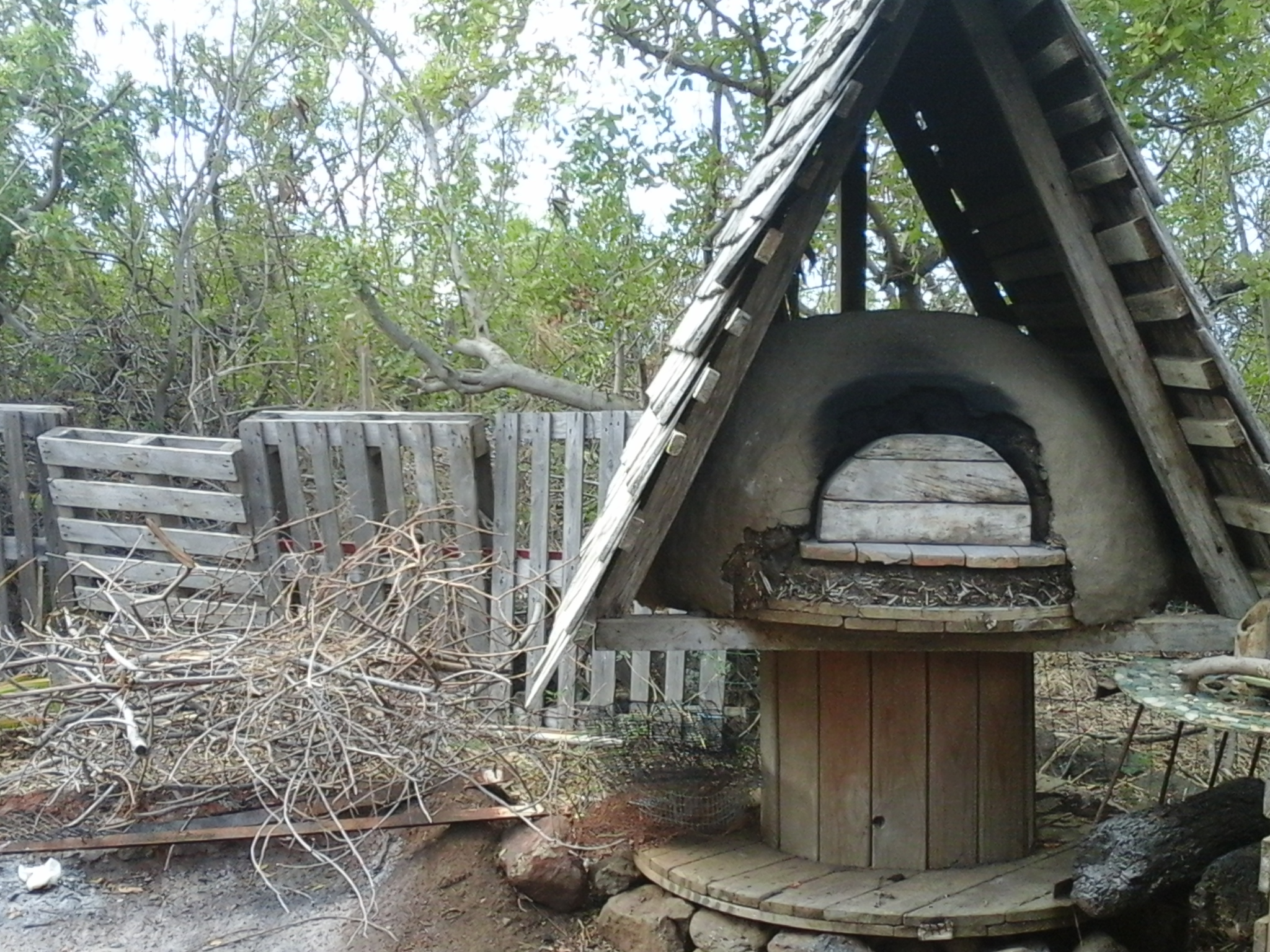 Four à pain traditionnel et une cuisine réalisés avec la Terre de Bois-Rouge - Saint Paul. Ile de La Réunion